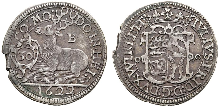 Münze Württemberg Siber: Halber Hirschgulden „Kippergulden“, Julius Friedrich, 1622